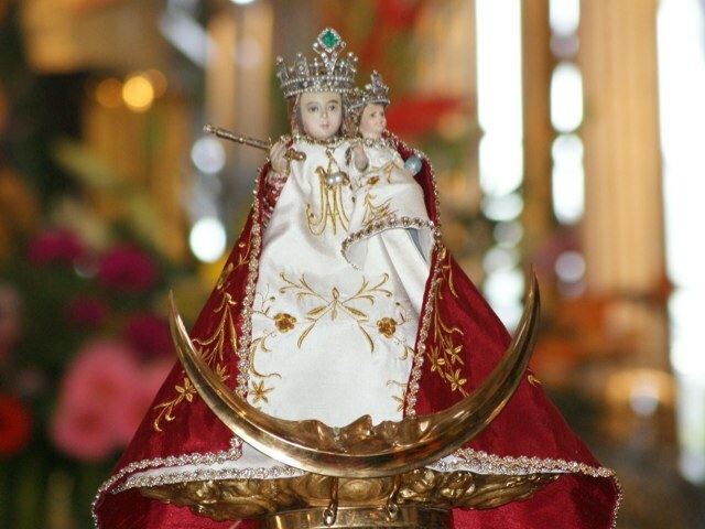 Esta imagen es la más antigua del continente americano, hecha en el siglo XVI por un desconocido artesano español, es de madera estofada y mide 27 cm. De alto se le sobre pone n vestidos coronas y una luna bajo sus pies.